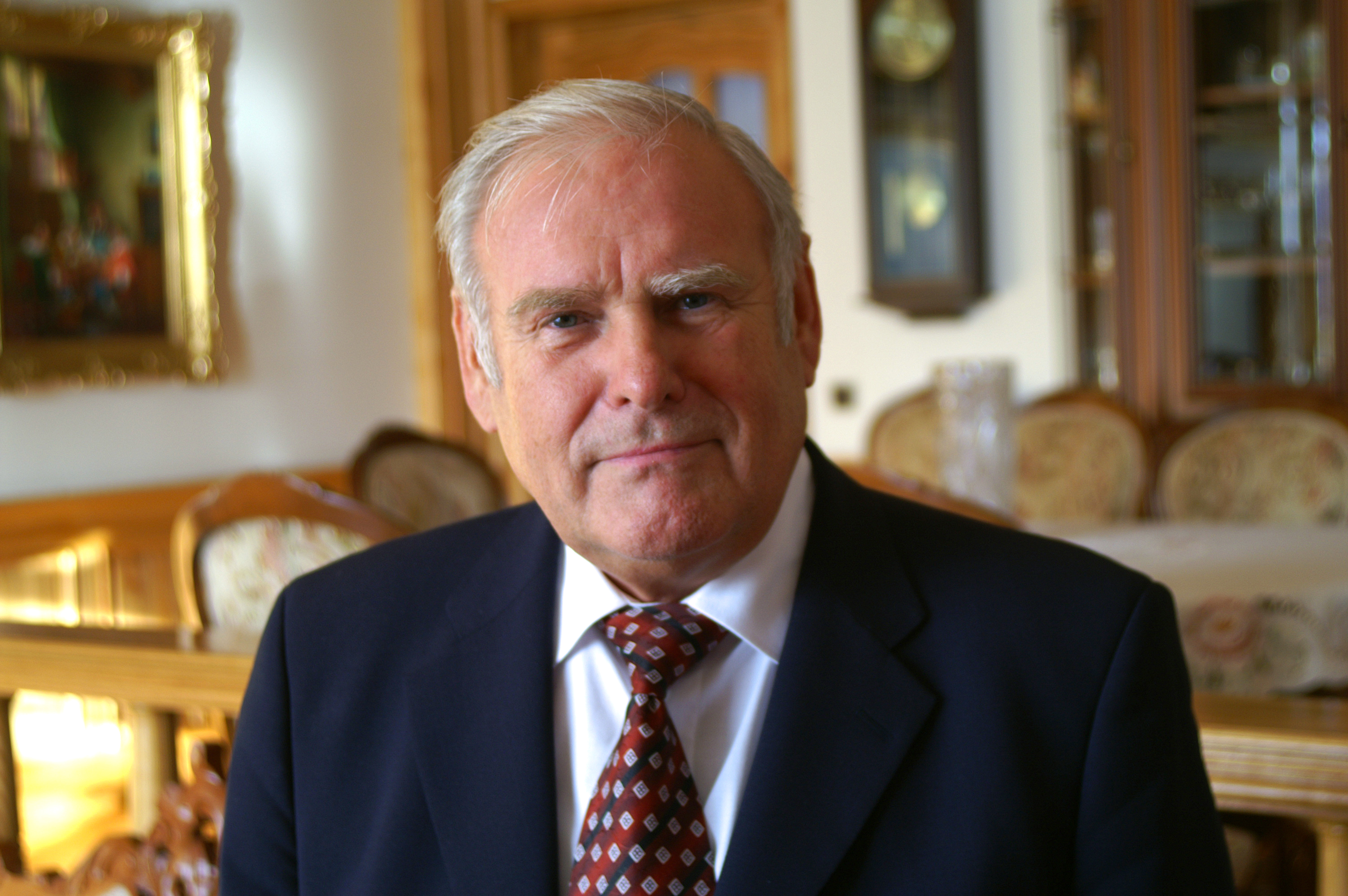 Bronislovas Lubys 13. května 2005